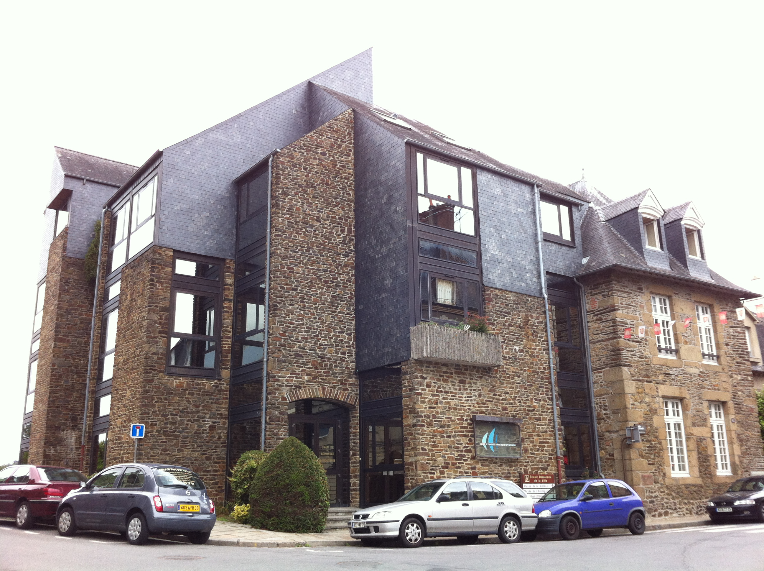 Sede de la Cámara de Comercio e Industria de Saint-Malo y Fougères en Fougères.